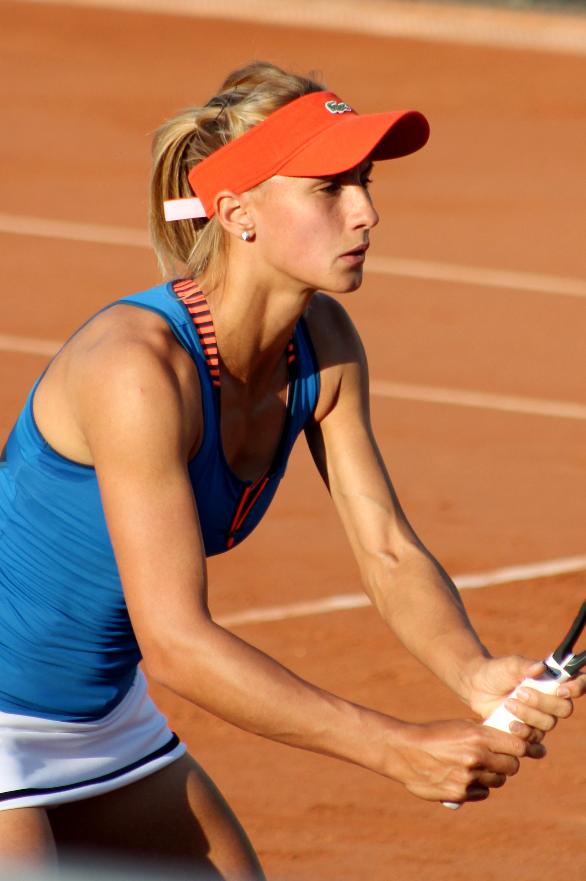 Tsurenko RG15 (5)